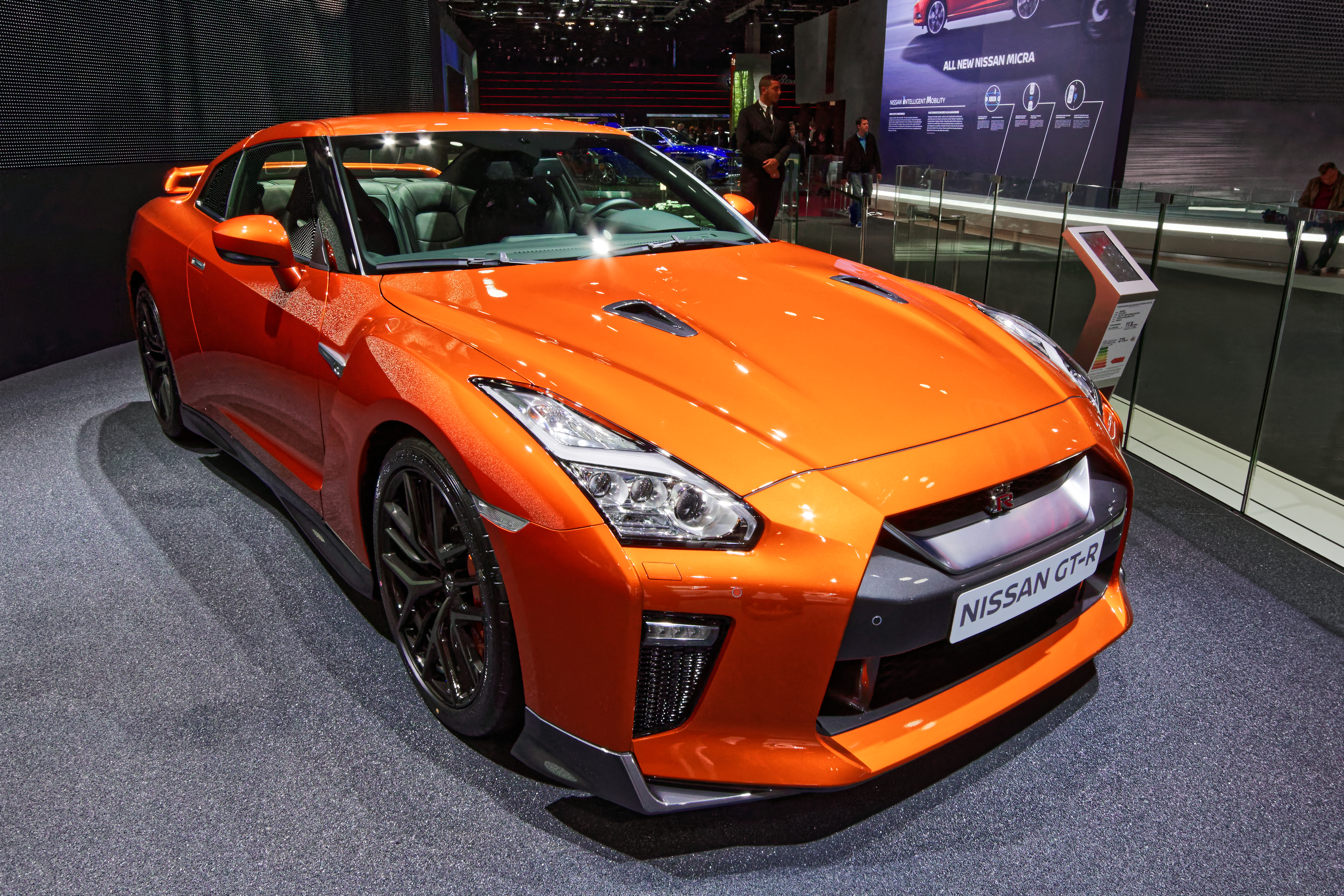 Une Nissan GT-R présentée lors du mondial de l'automobile de Paris 2016.